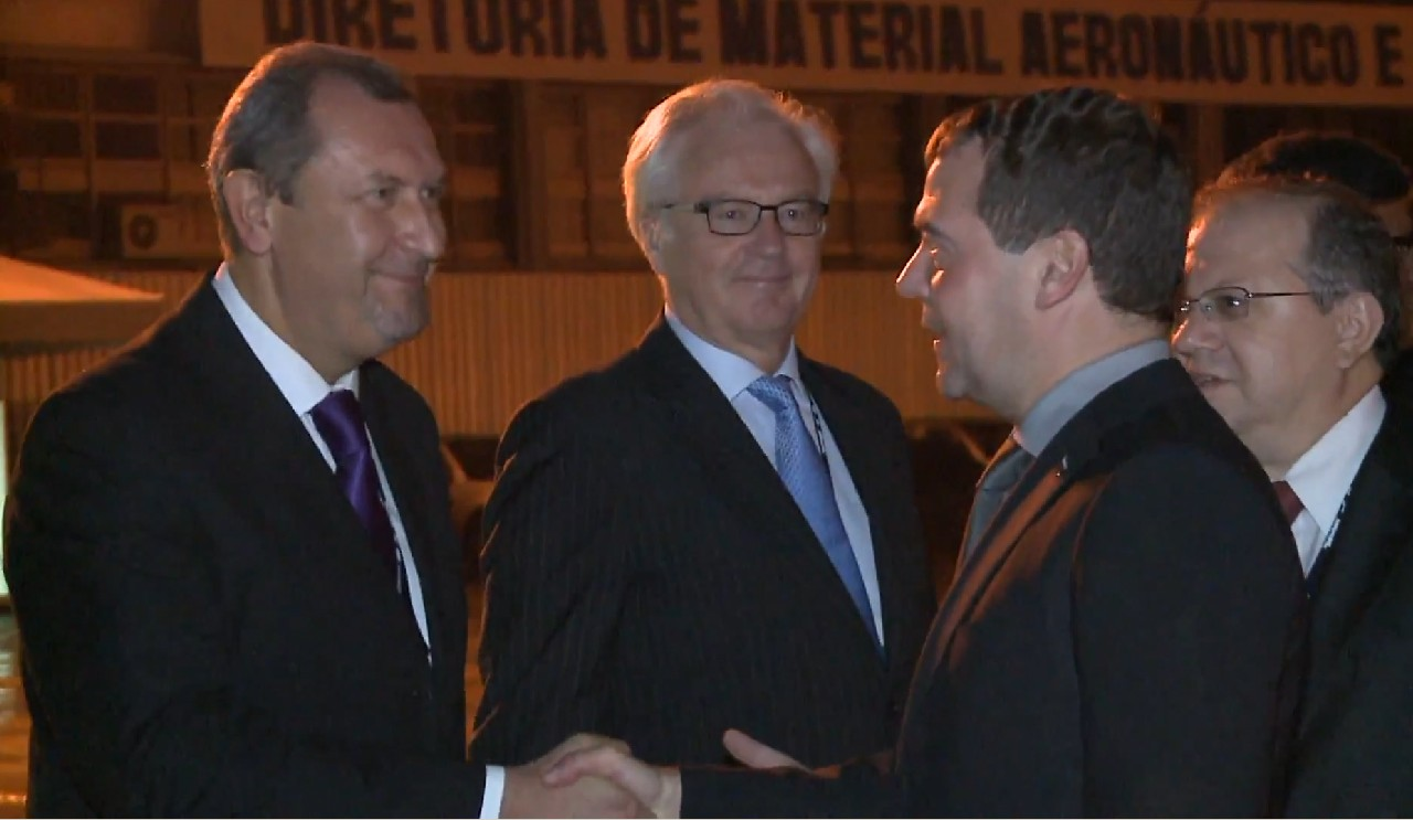 Встреча Председателя Правительства Российской Федерации Д.А.Медведева на воздушной базе «Галеао» г. Рио-де-Жанейро 20 июня 2012 г.